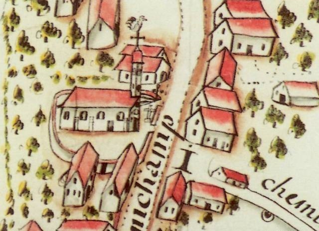 Dessin du centre de Ronchamp.